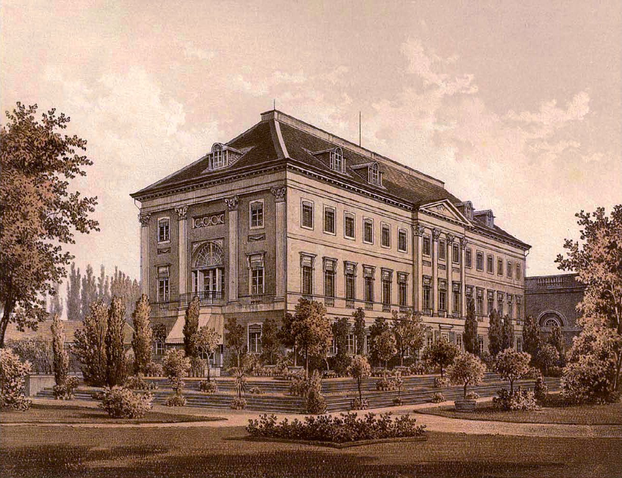 Schloss Neindorf, Kreis Oschersleben, Provinz Sachsen